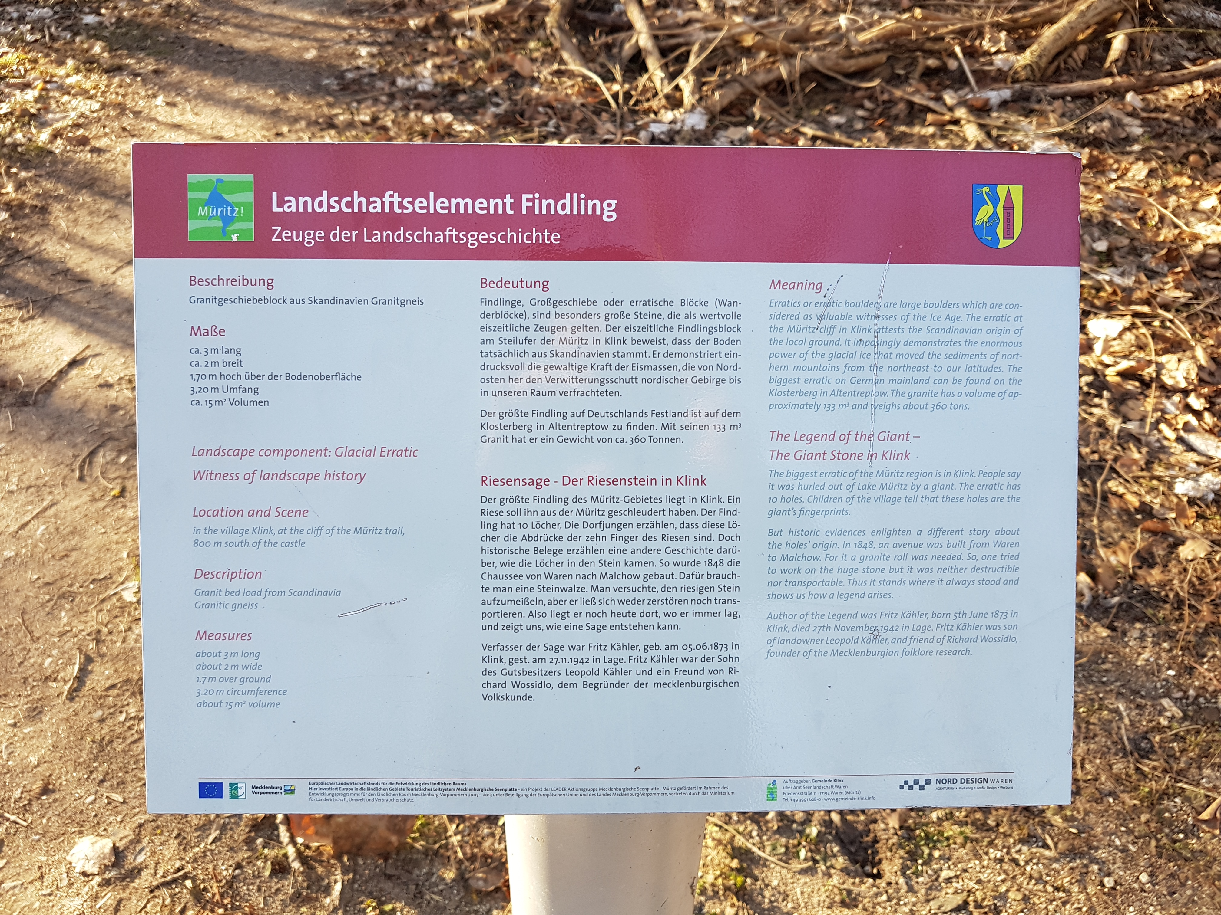 Erläuterungstafel für den Riesenstein in Klink